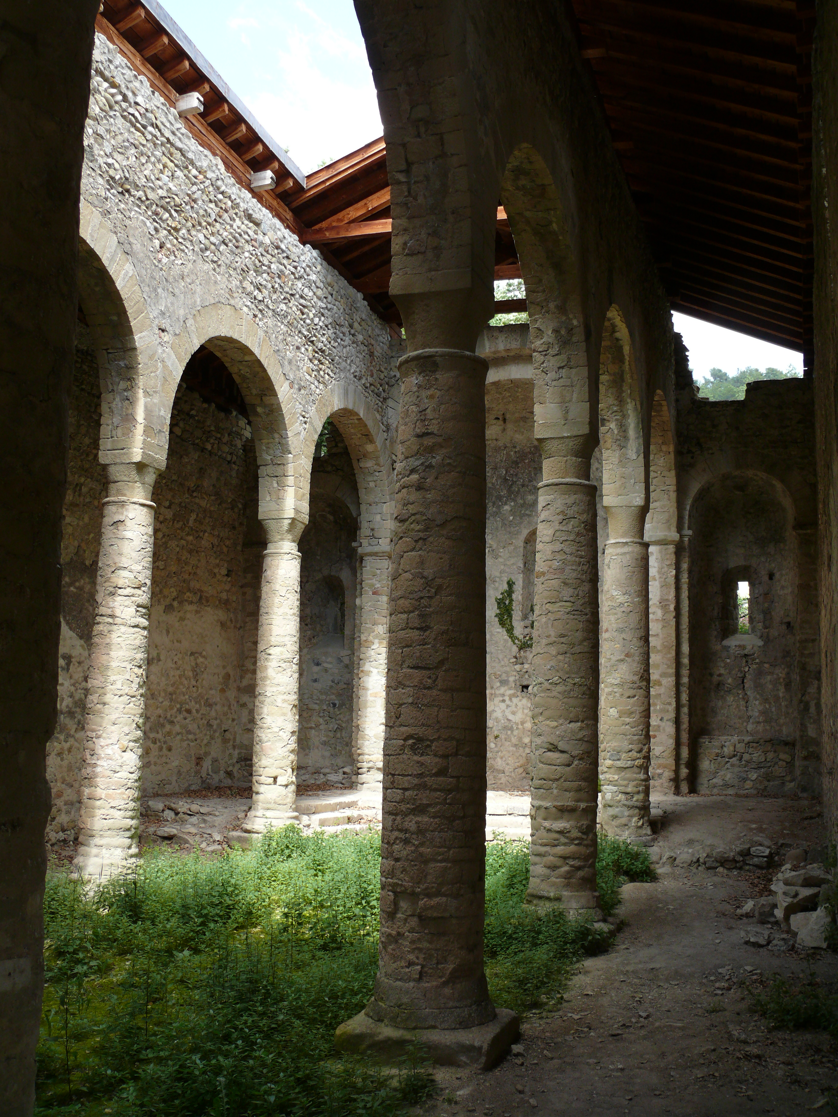 Volonne - Eglise Saint-Martin